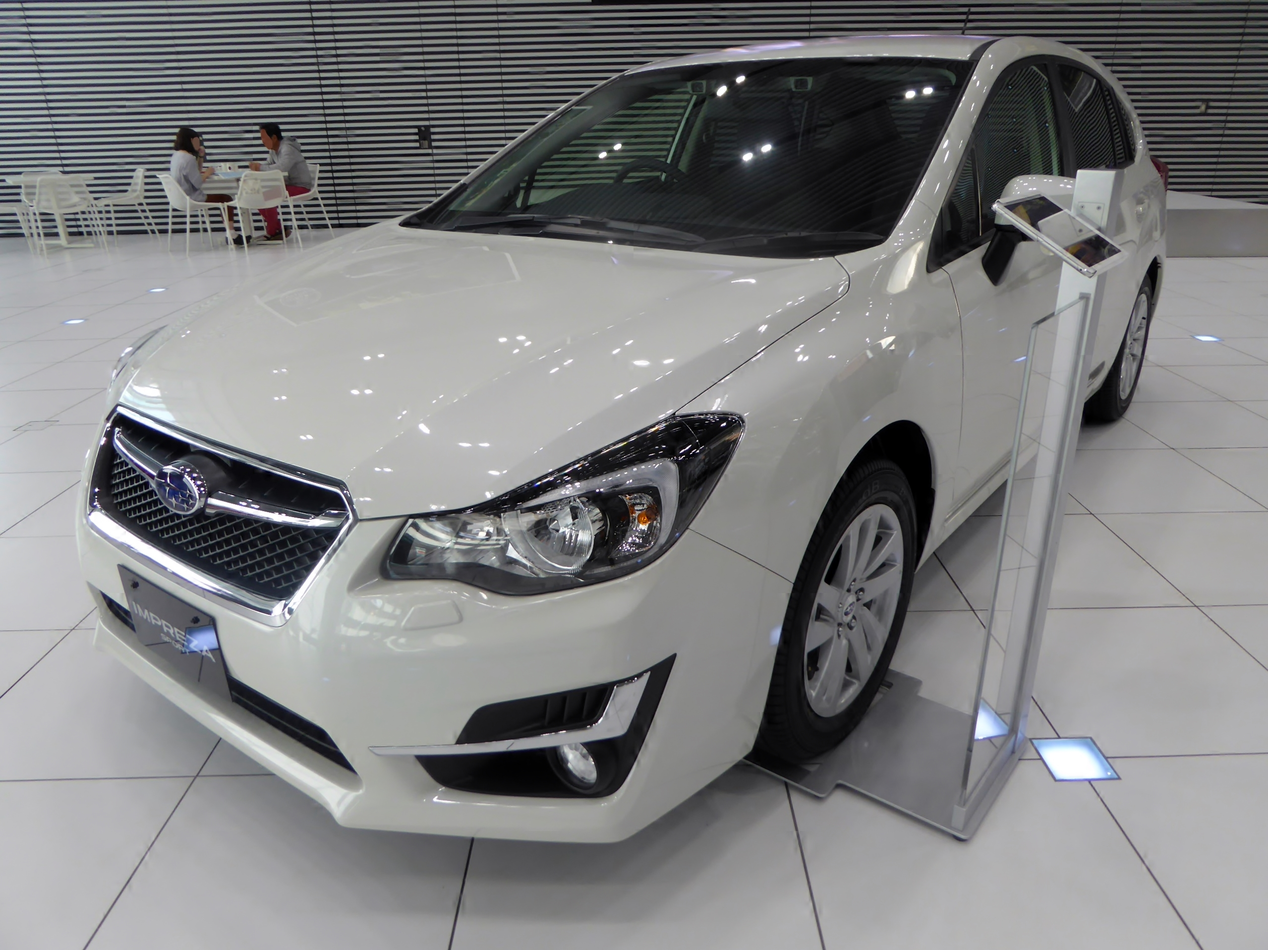 DBA-GP7型スバル・インプレッサスポーツ2.0iアイサイトをフロントから撮影。